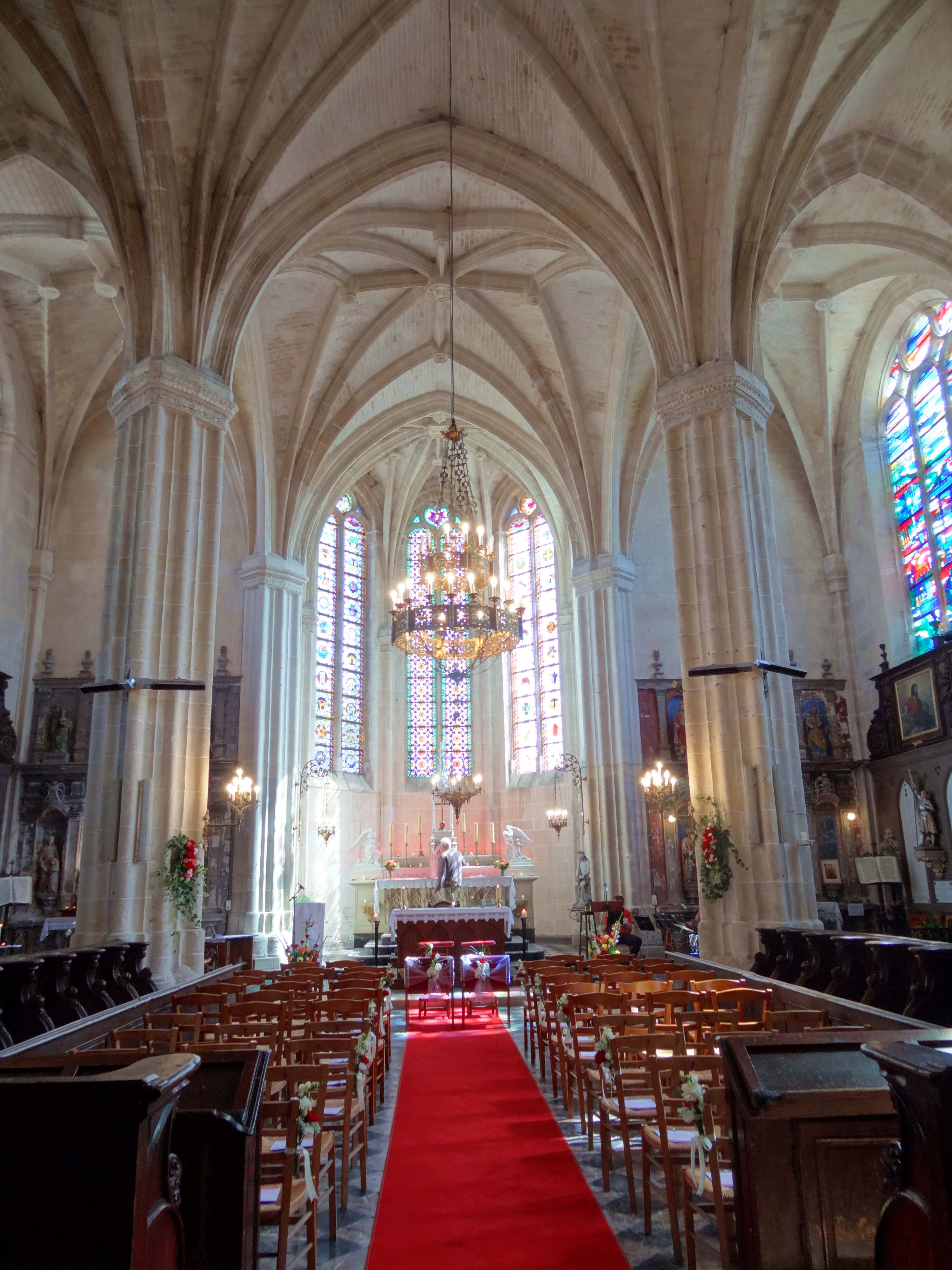 Intérieur de l'église - voir titre.